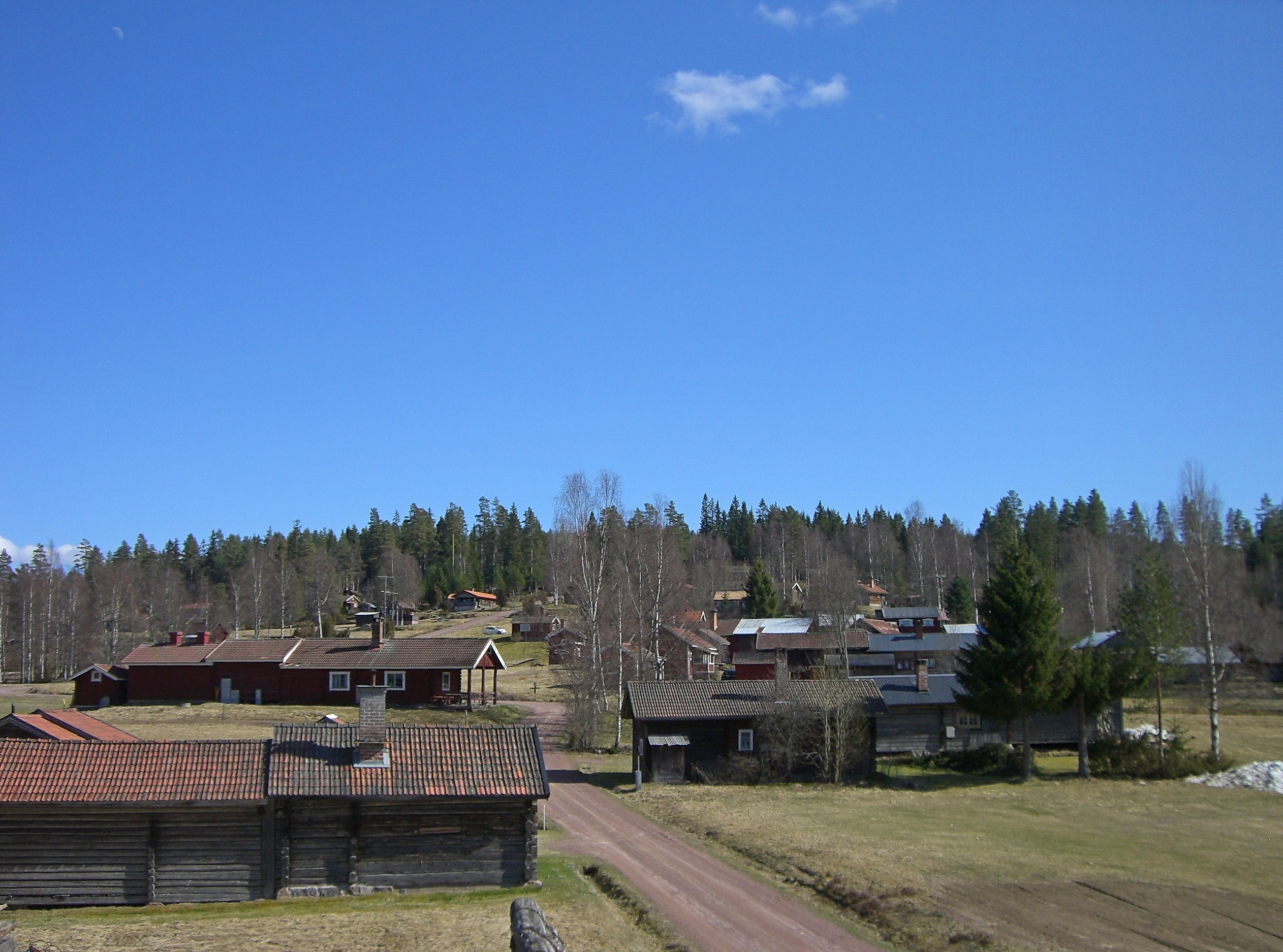 Hökbergs fäbodar 2012.